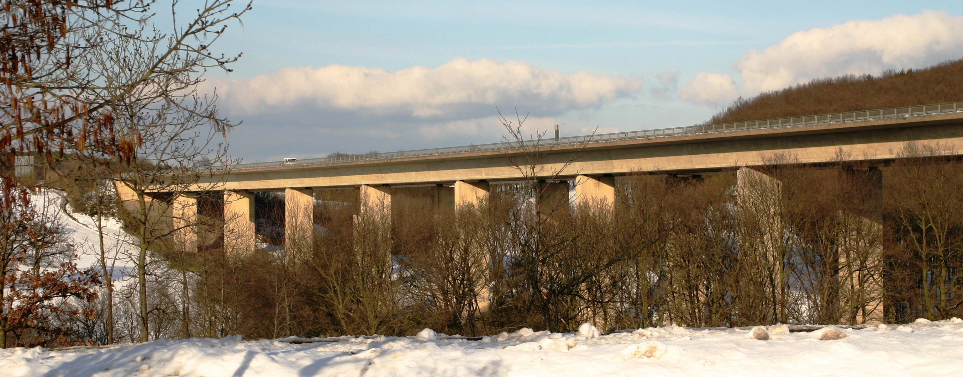 Viaduc sur la Vallée du Krebsbach au Pk 466,7 de l'Autoroute allemande A1